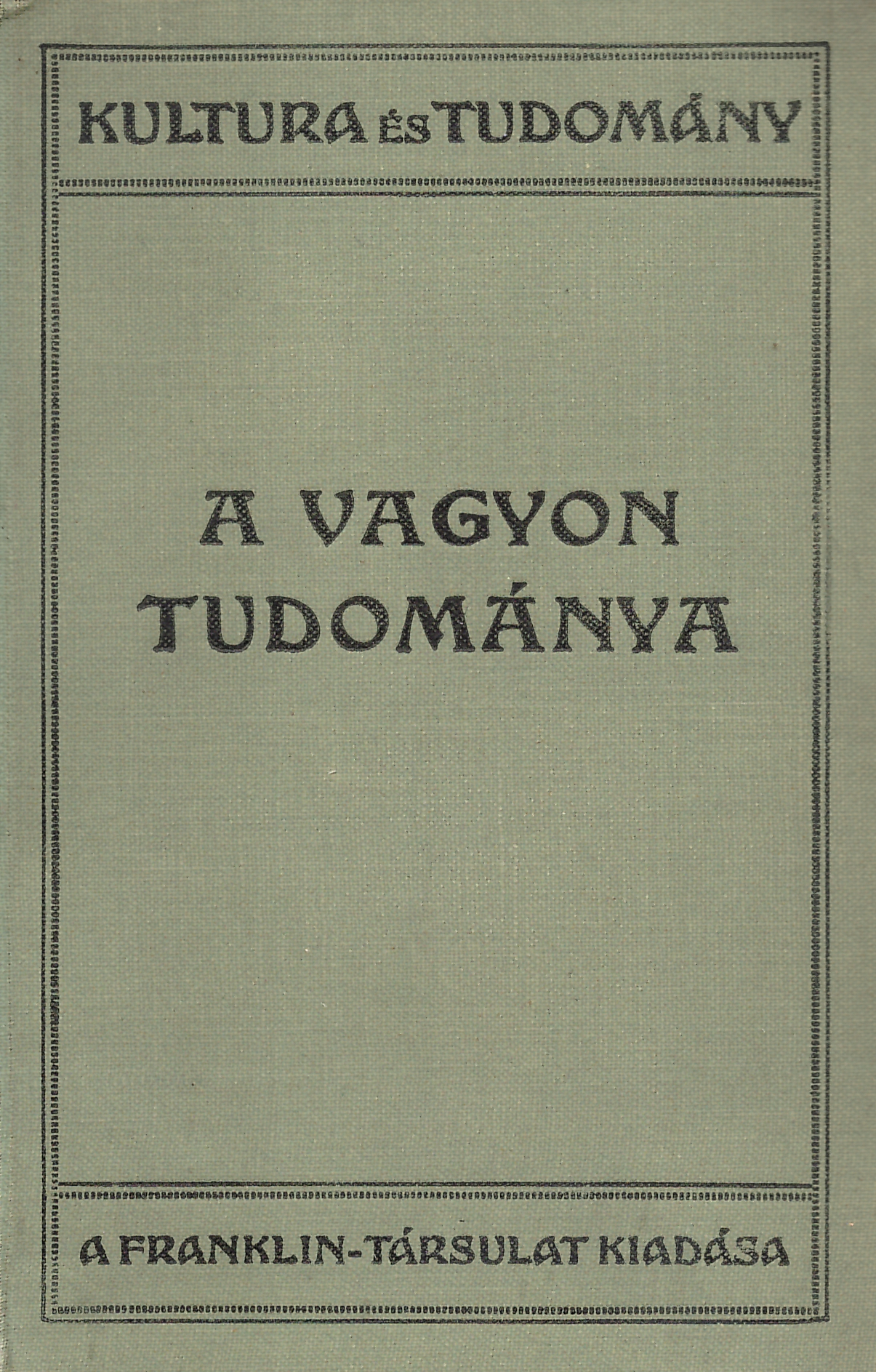 John Atkinson Hobson (1858-1940): A vagyon tudománya (1920-as évekbeli kiadás)